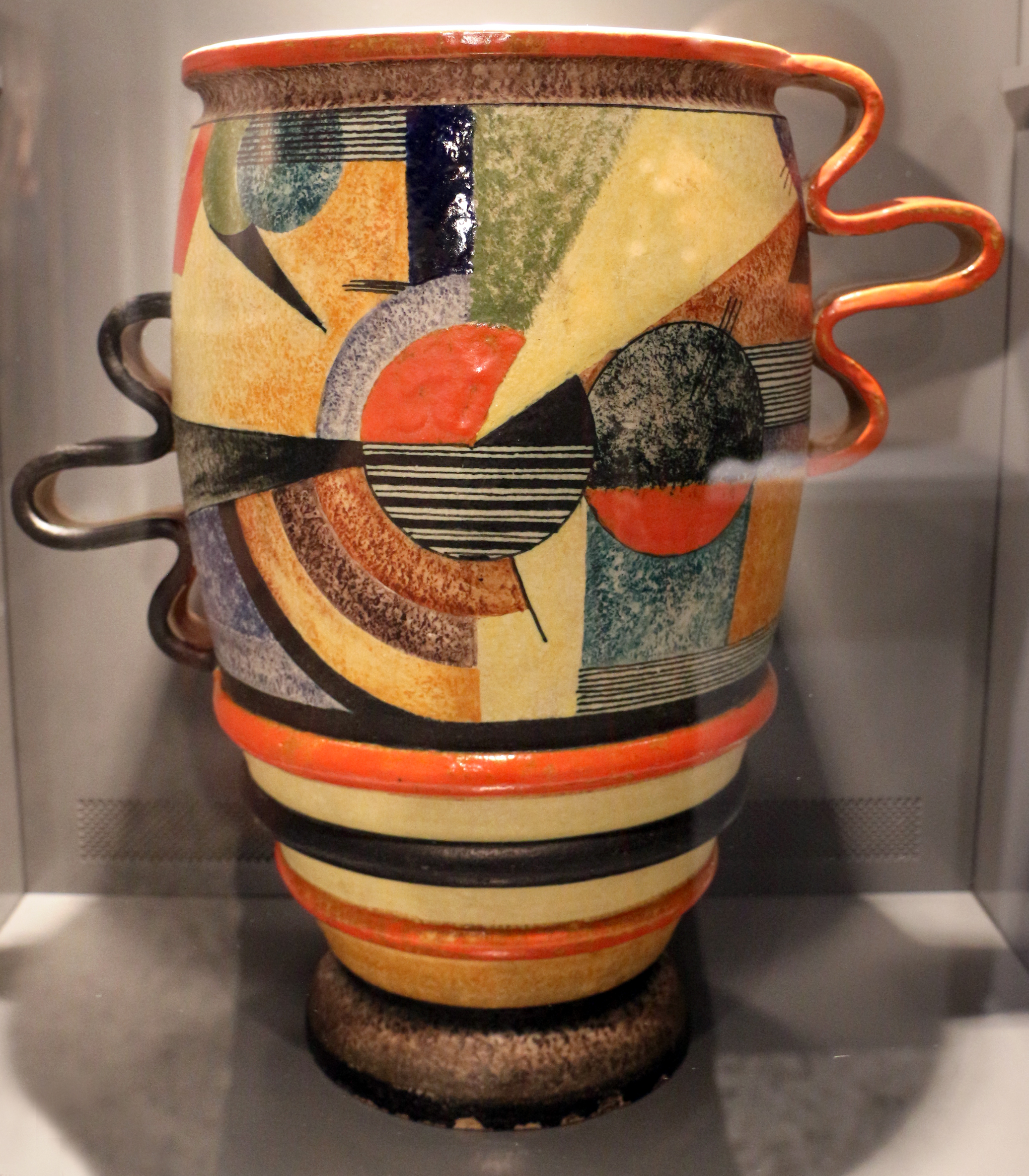 Il parco e i musei di Nervi This is a photo of a monument which is part of cultural heritage of Italy.